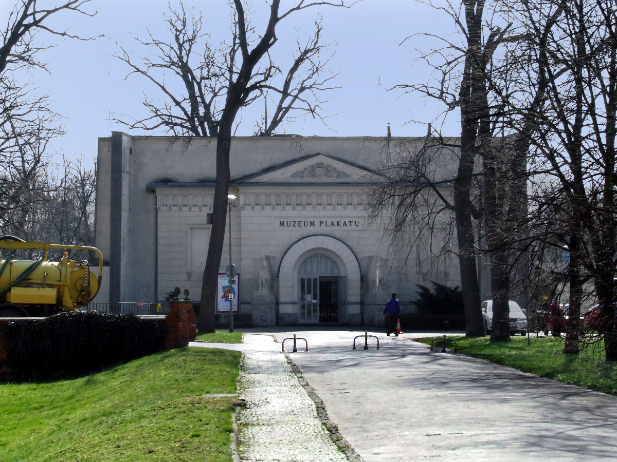 Muzeum Plakatu, Wilanów, Warszawa